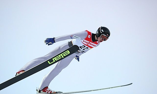 Tomasz Byrt podczas serii treningowej przed konkursem indywidualnym mężczyzn na Mistrzostwach Świata w Narciarstwie Klasycznym 2011 w Oslo.